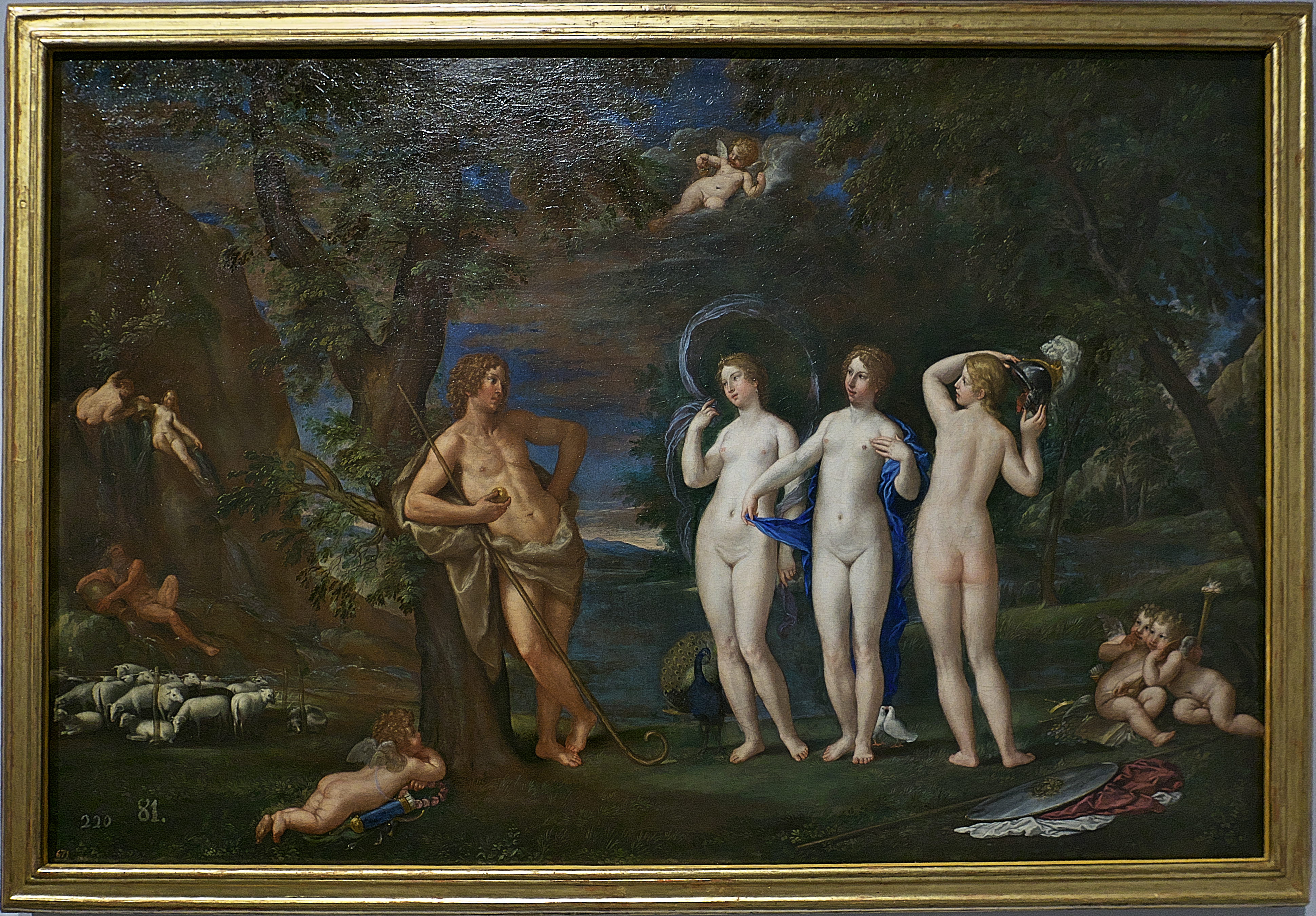 Óleo sobre lienzo (1650-1660), pintura destinada al Palacio del Buen Retiro. Juno, Venus y Minerva, ofrecen a Paris, además de su belleza, otras proposiciones, a fin de conseguir la manzana dorada. Venus será la ganadora, y las consecuencias del acuerdo, trágicas.